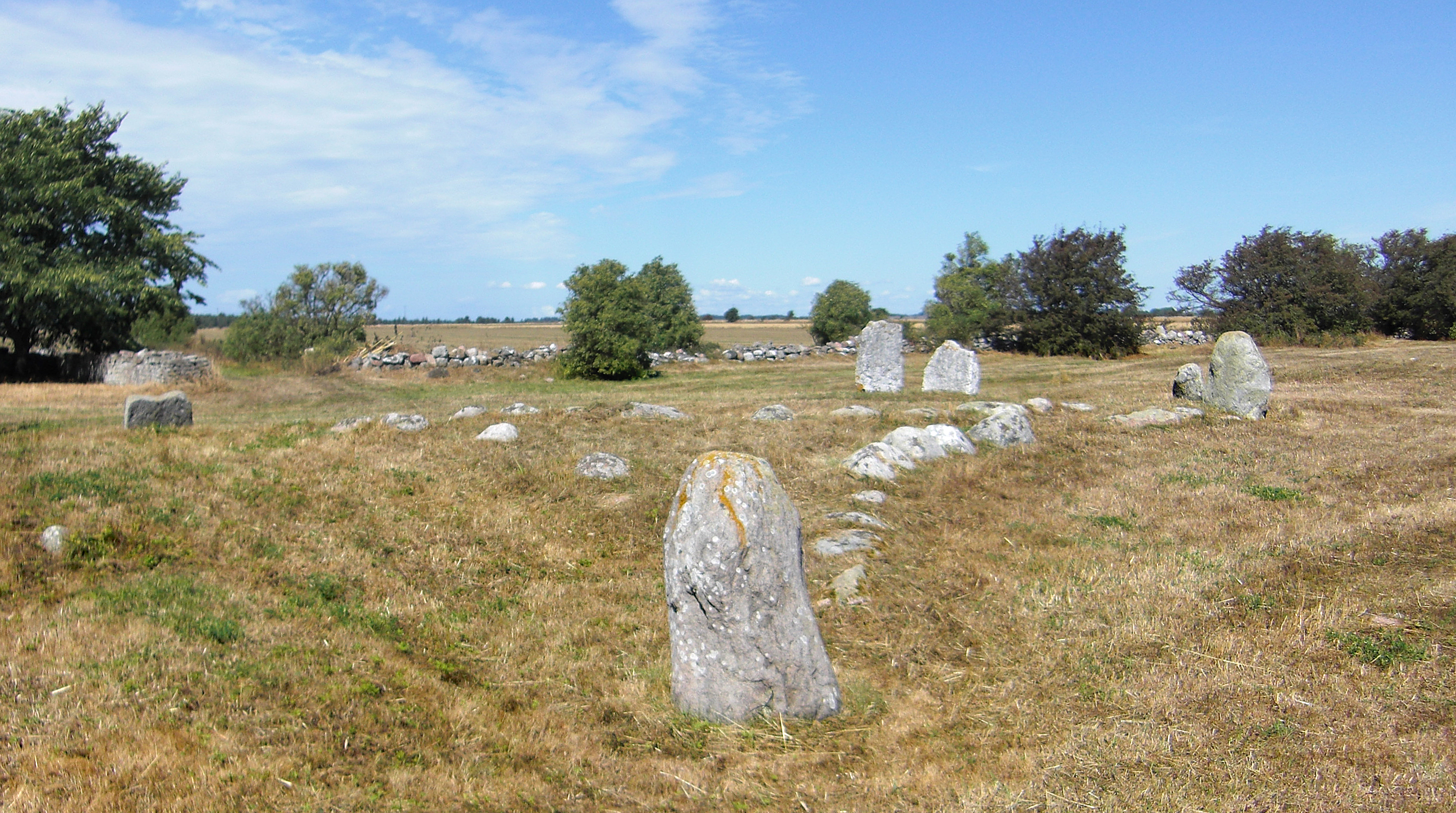 Treudd på Seby gravfält (Raä-nr Segerstad 24:1) i Segerstads socken, Mörbylånga kommun, Öland, Kalmar län, Sverige.